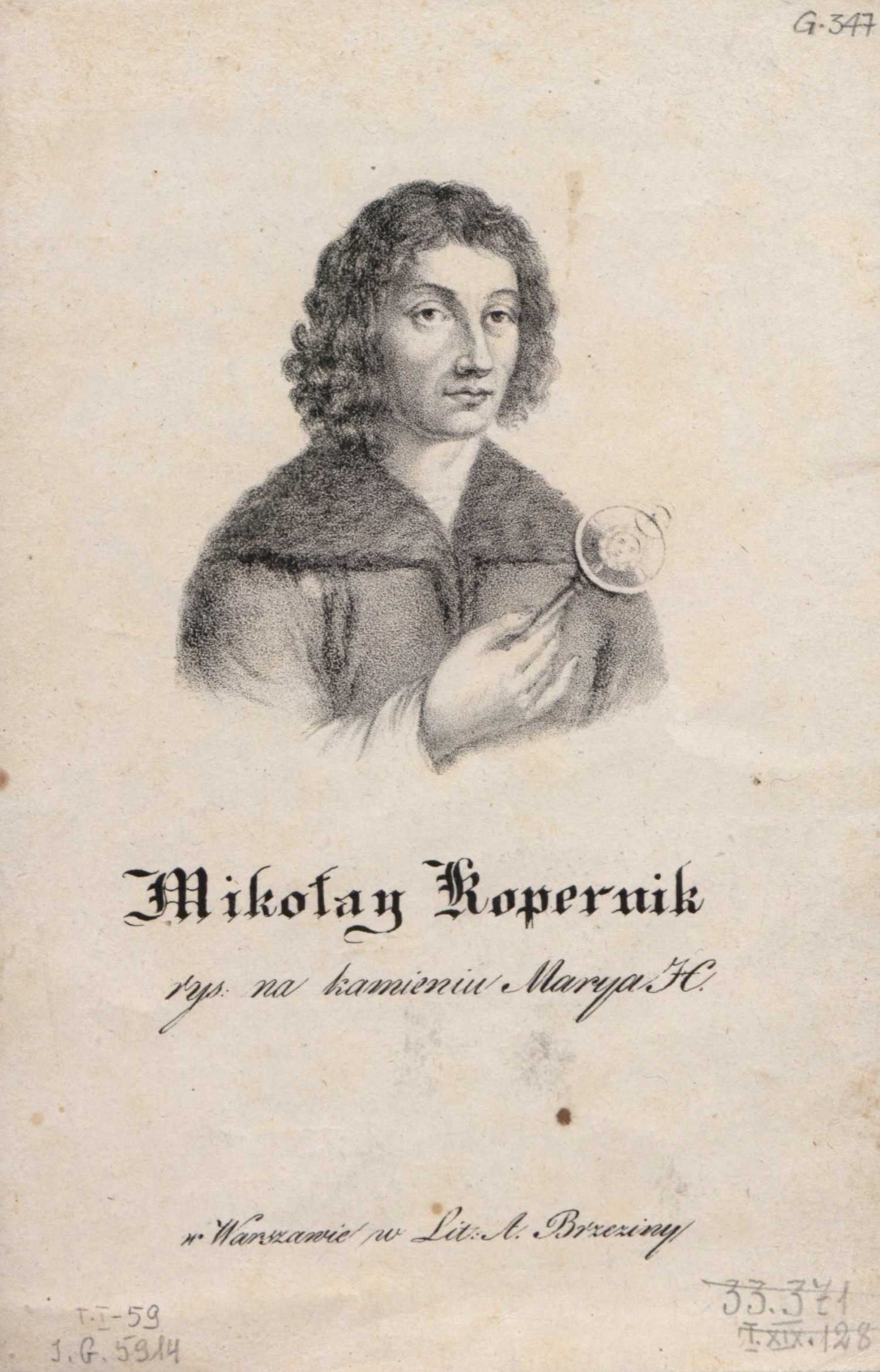 Maria Herman, Mikołaj Kopernik, 1825, litografia, wyd. w Lit. A. Brzeziny (Warszawa)